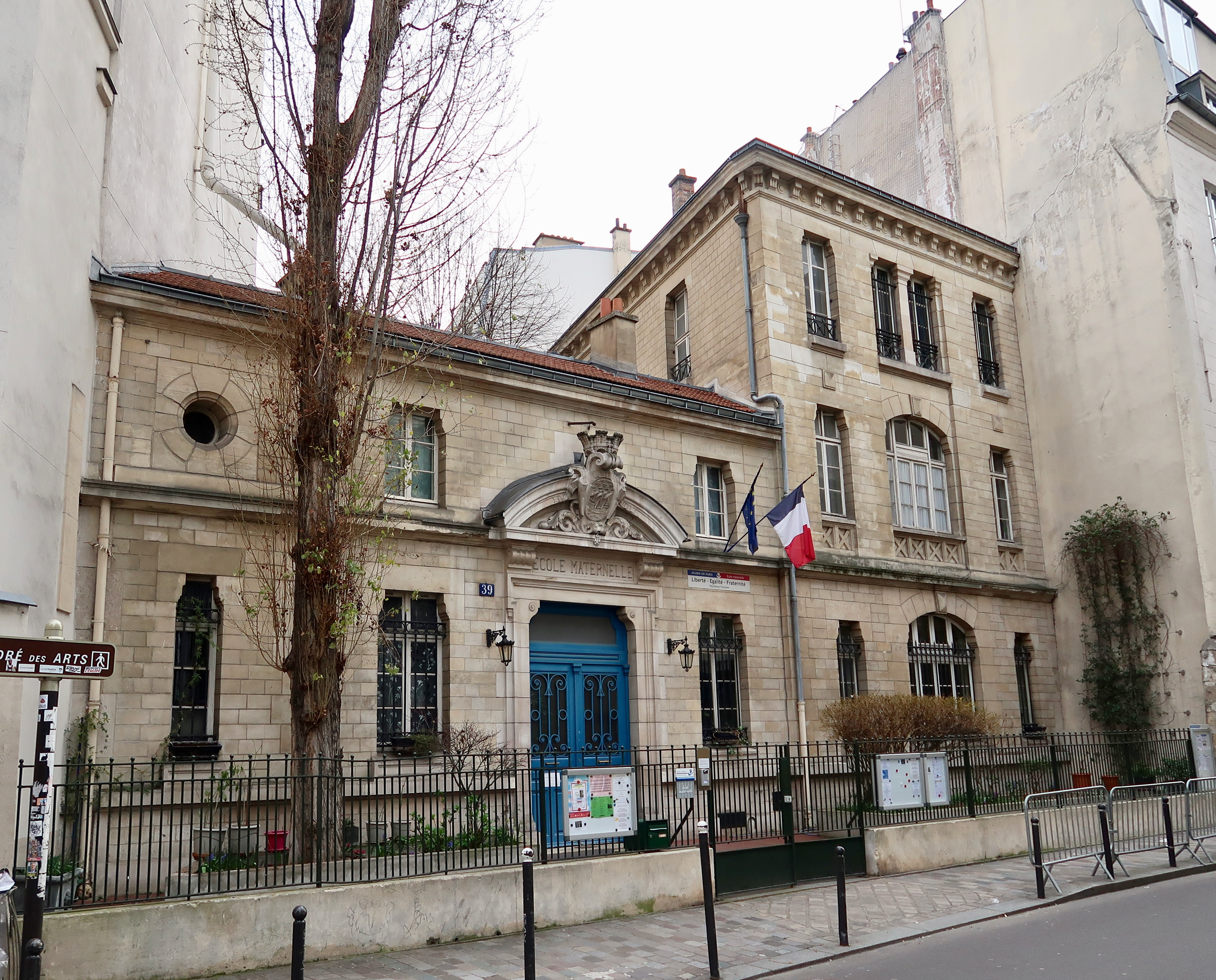 École maternelle, 39 Saint-André-des-Arts (Paris, 6e).